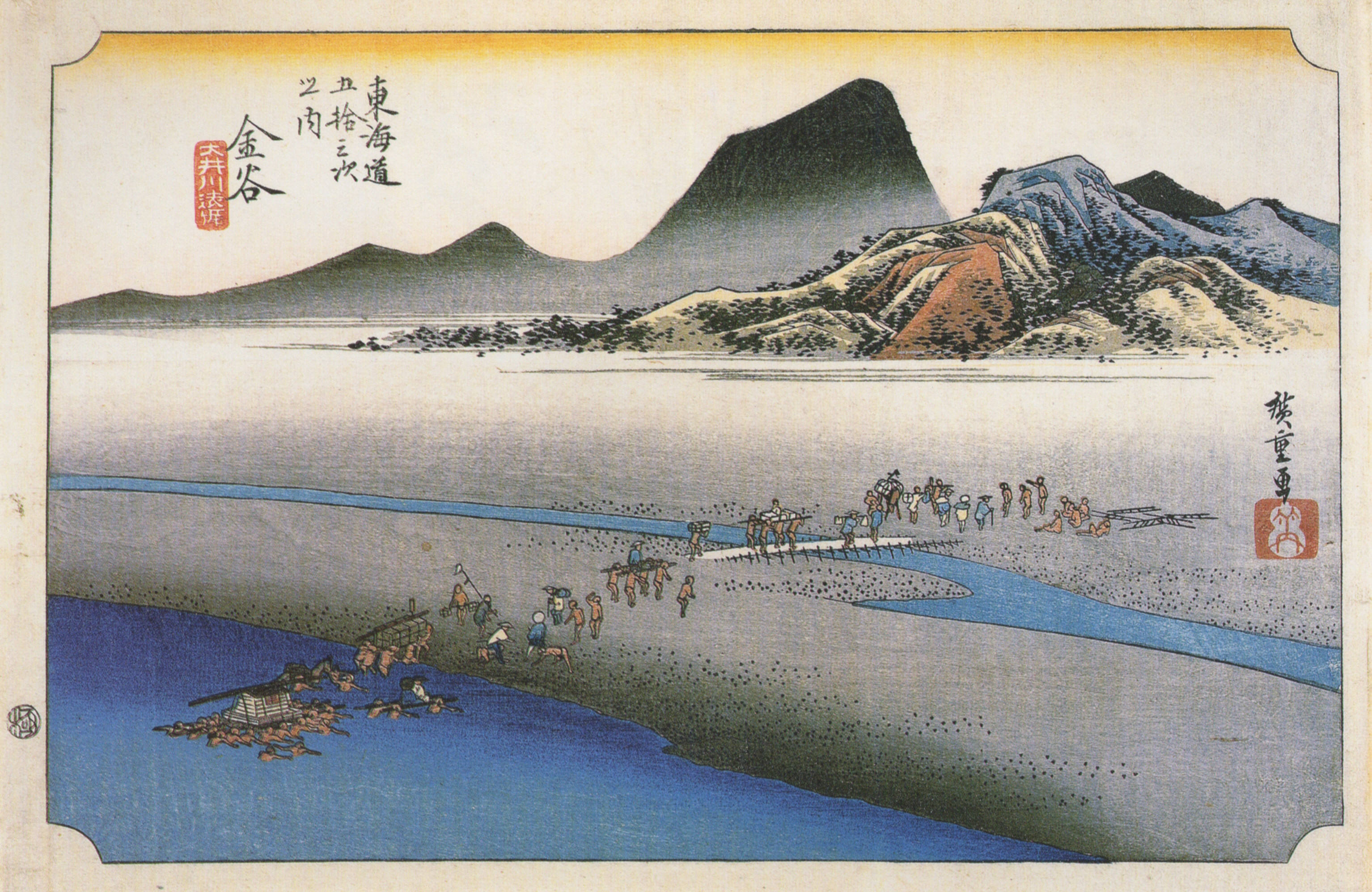 "Tokaido-53tugi Kanaya",ukiyo-e by Hirosige.